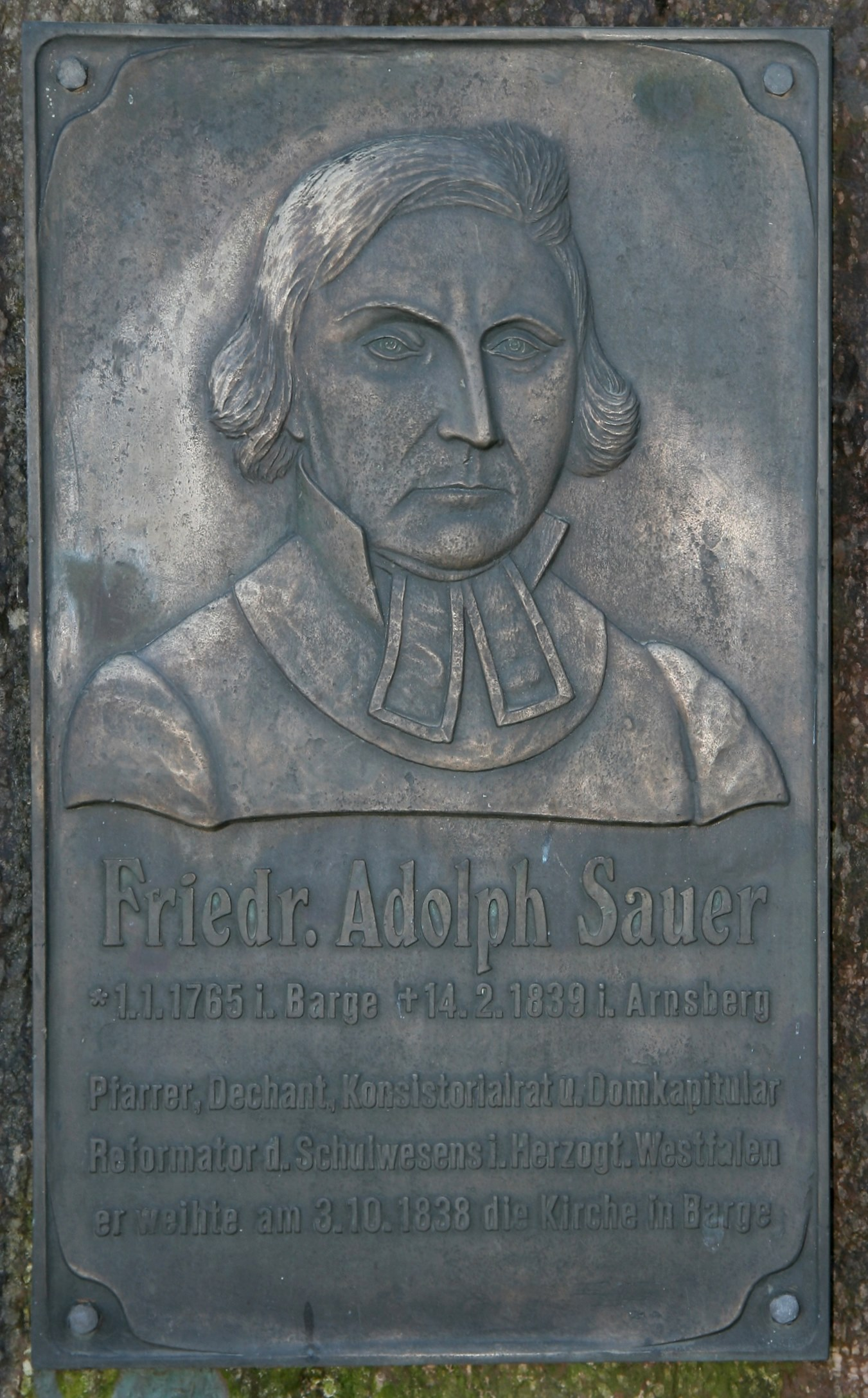 Erinnerungstafel an Friedrich Adolph Sauer auf einem Stein an der katholischen Kirche St. Johannes Baptist in Menden (Sauerland)-Barge.